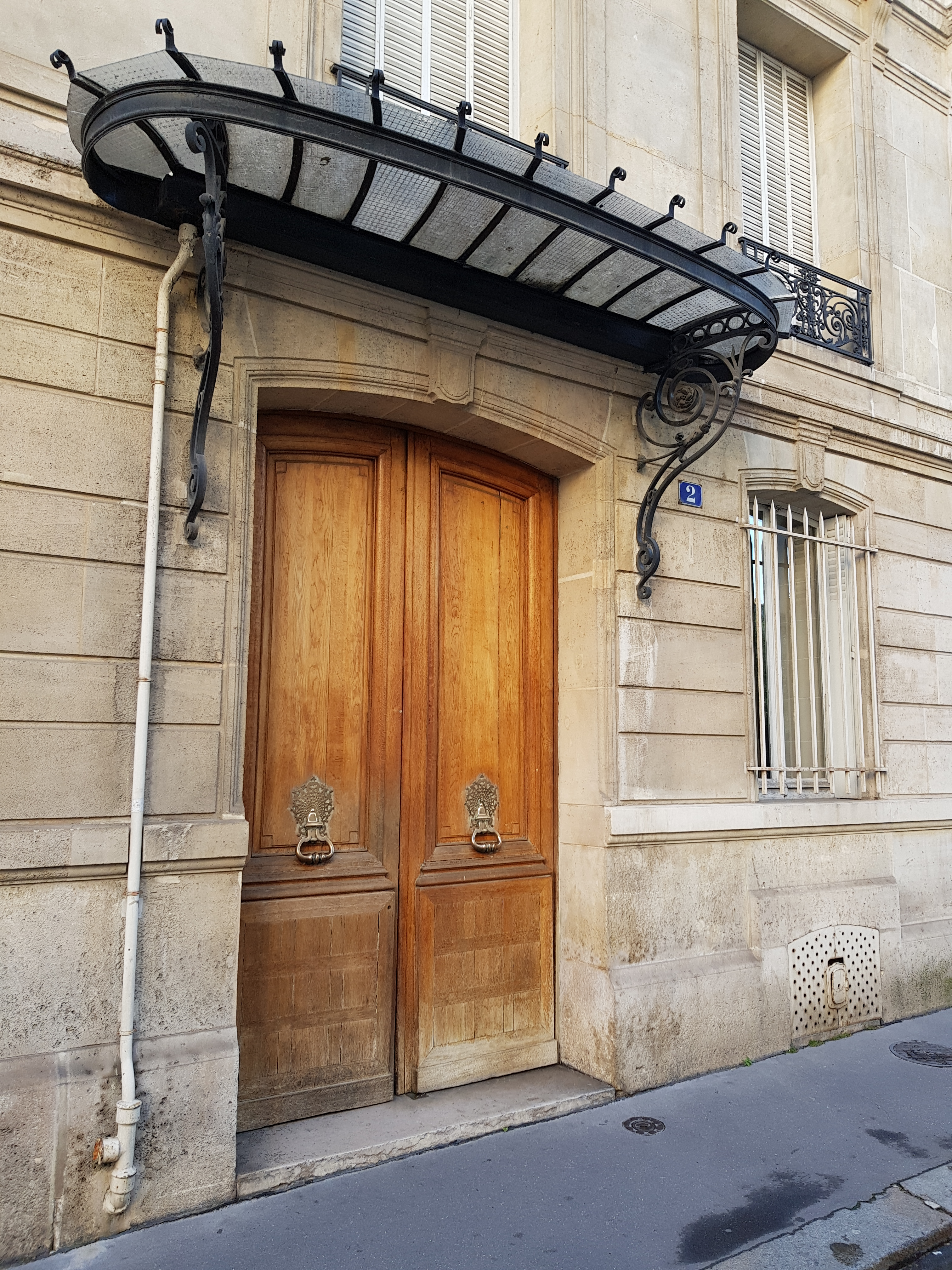 Entrée du 2, rue de Saigon, Paris 16e.